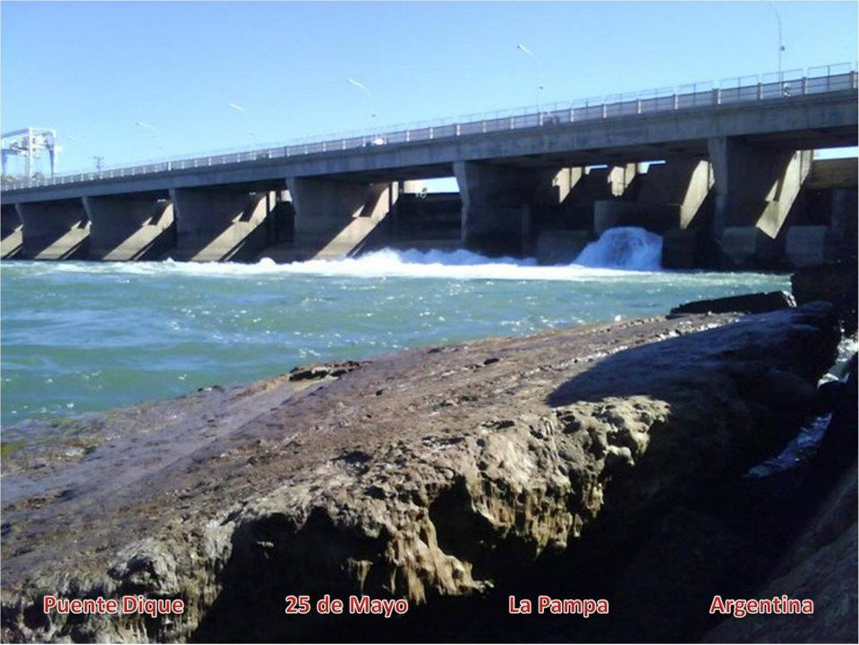 Rio Colorado a la altura de 25 de Mayo La Pampa.